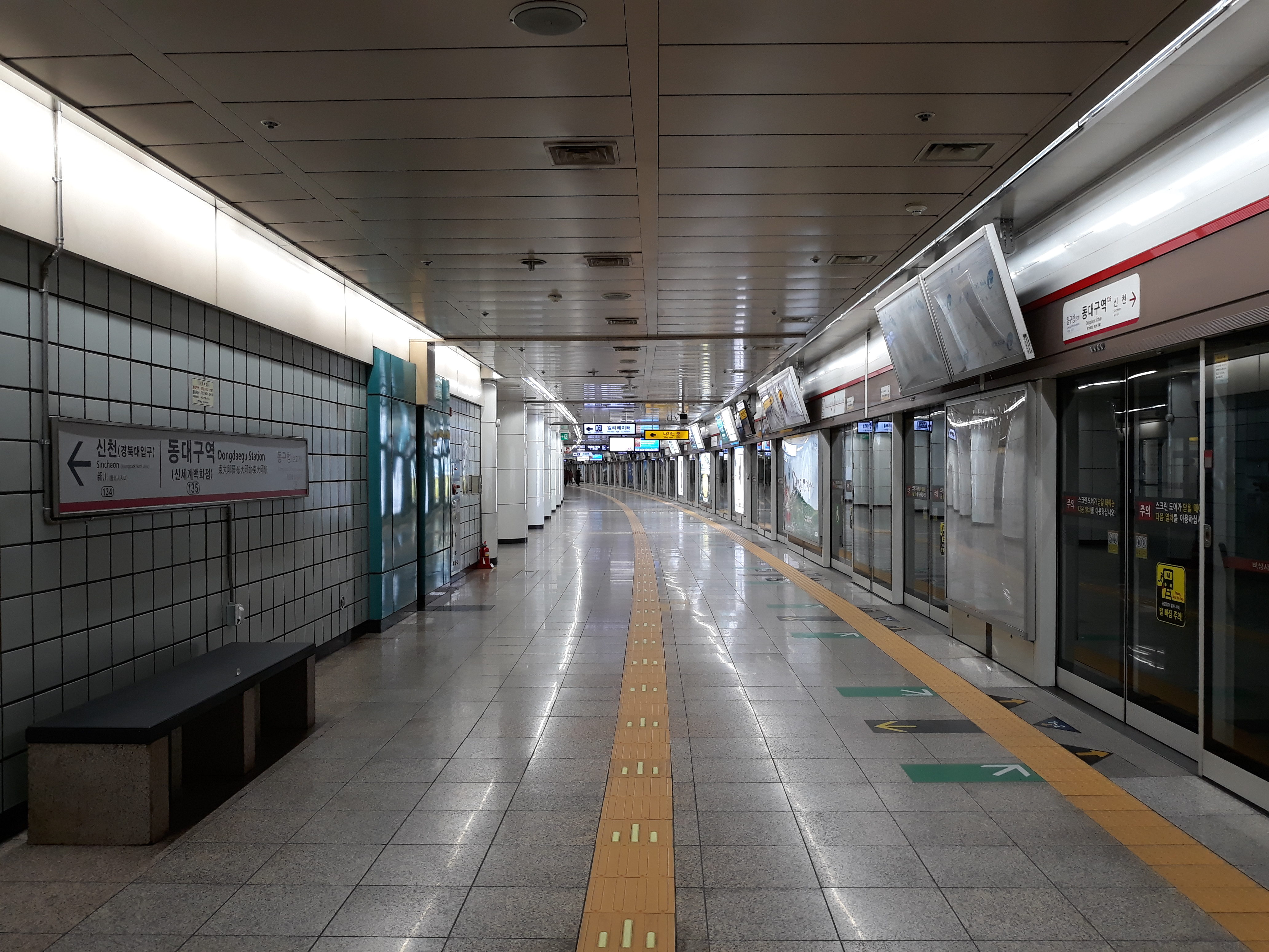 대구 도시철도 1호선 동대구역 설화명곡 방면 승강장